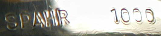 Typische Spahr Silberpunze